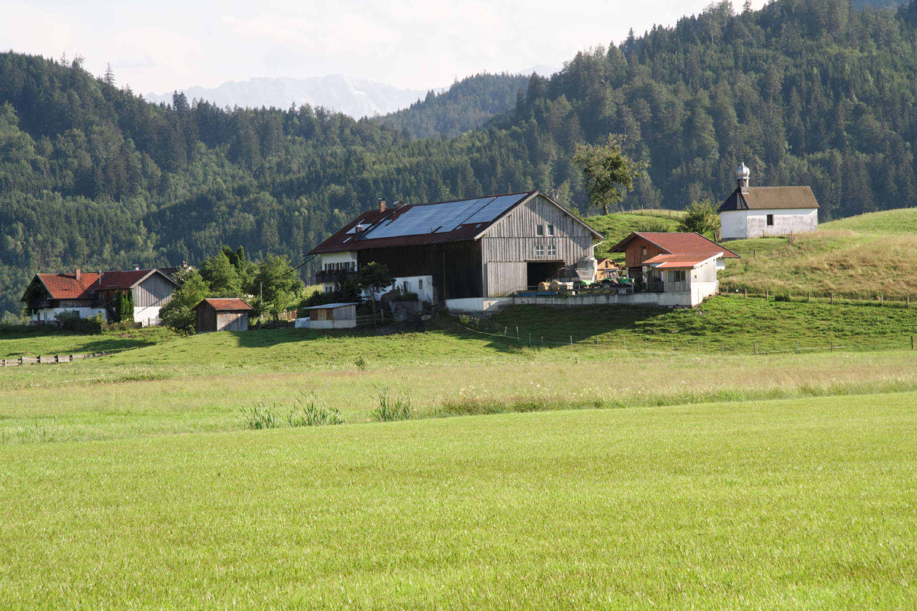 Hof mit Kapelle im Ortsteil Apfelbichel der Gemeinde Schwaigen im Landkreis Garmisch-Partenkirchen, Bayern